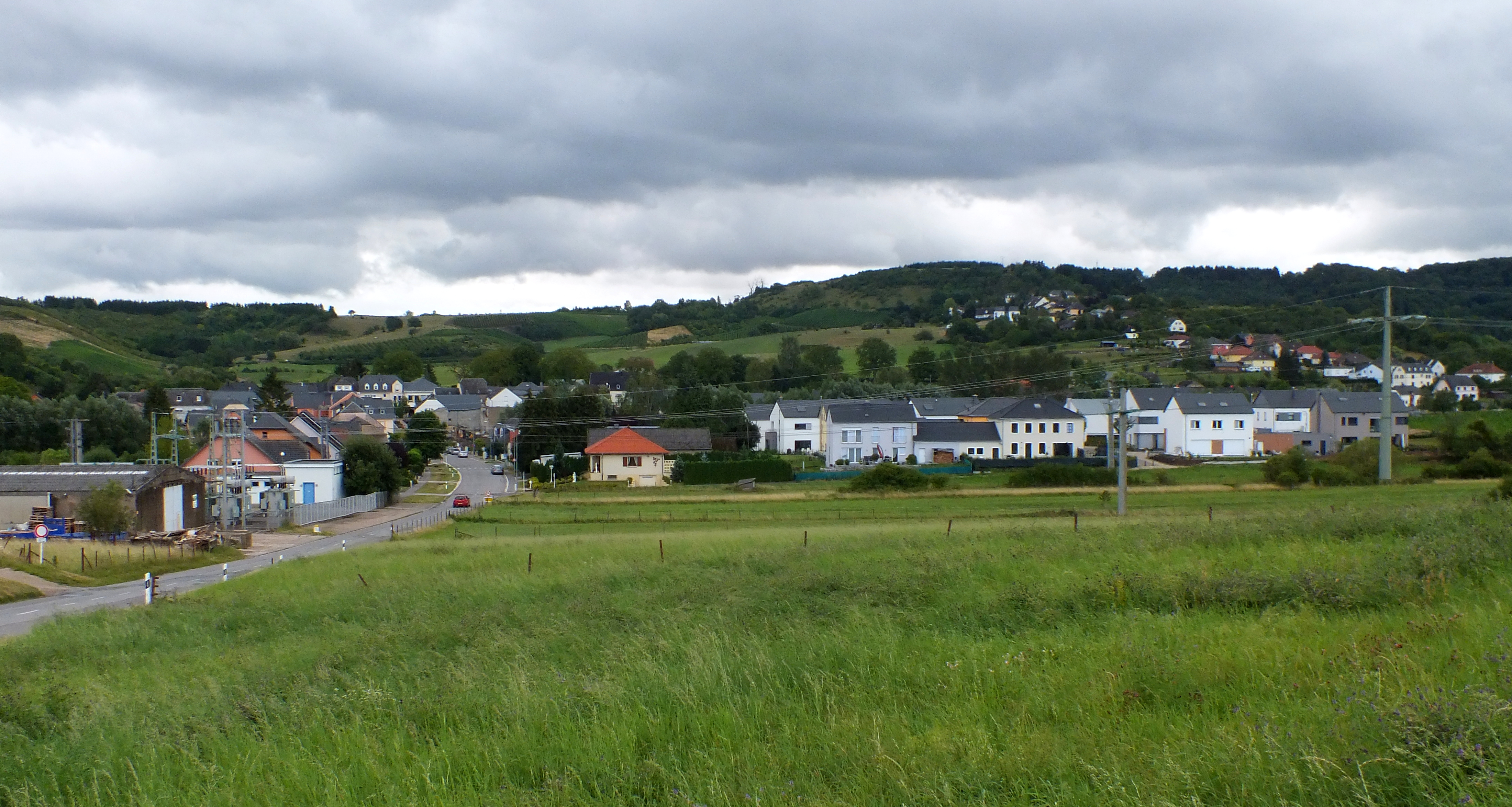 Vue vum CR148 op Ierpeldeng (Bus).